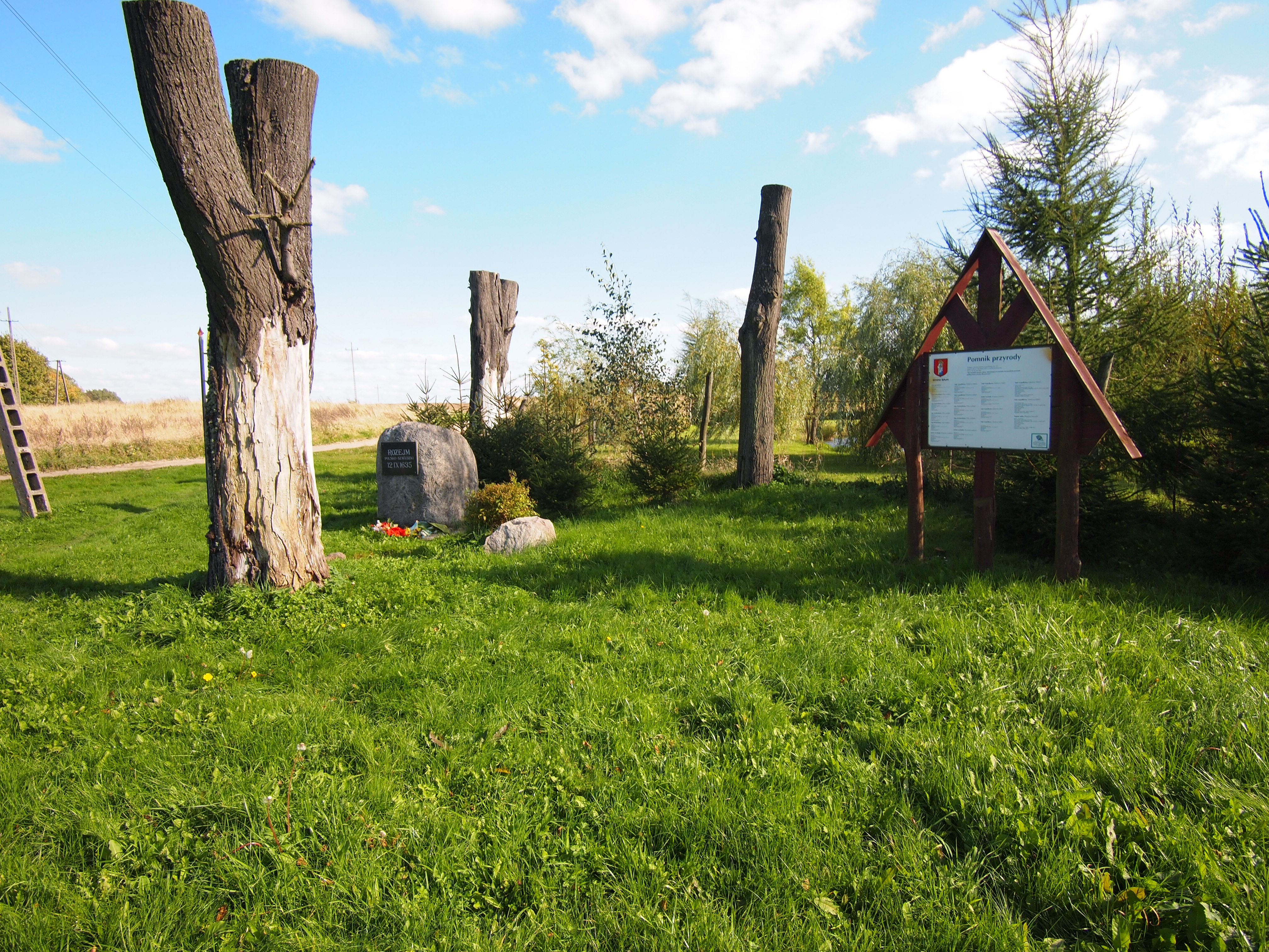 Armistice of Stuhmsdorf | Pokój w Sztumskiej Wsi